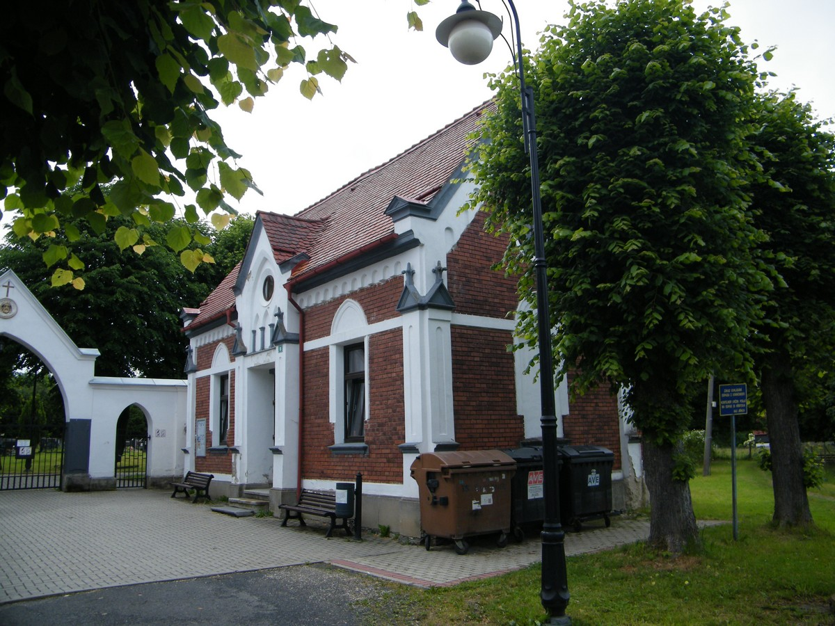 Dům správce